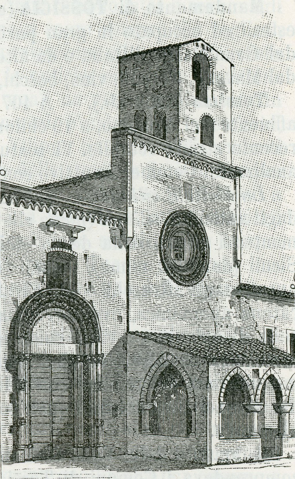 Morro d’Oro: chiesa di Santa Maria di Propezzano (incisore anonimo 1898).